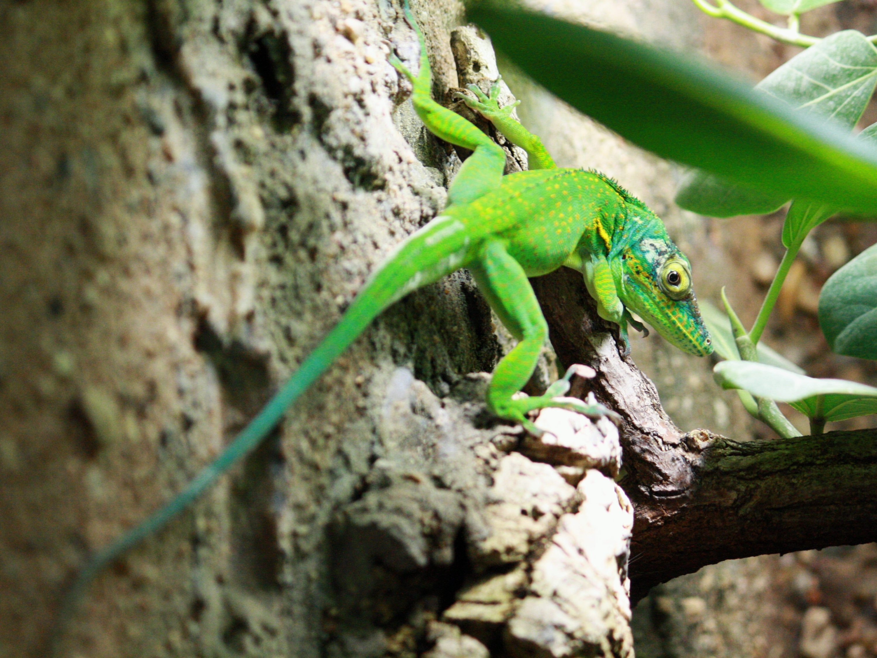 Česky: Anolis žlutohrdlý v Pražské zoo